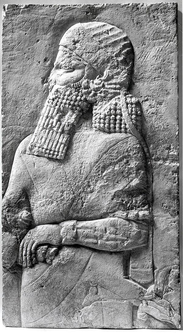 Assyrian; Relief; Stone-Reliefs